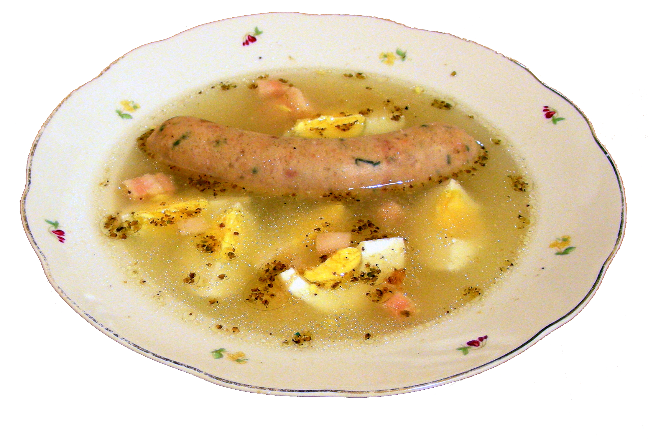 Talerz żurku z kiełbasą, boczkiem i jajkiem